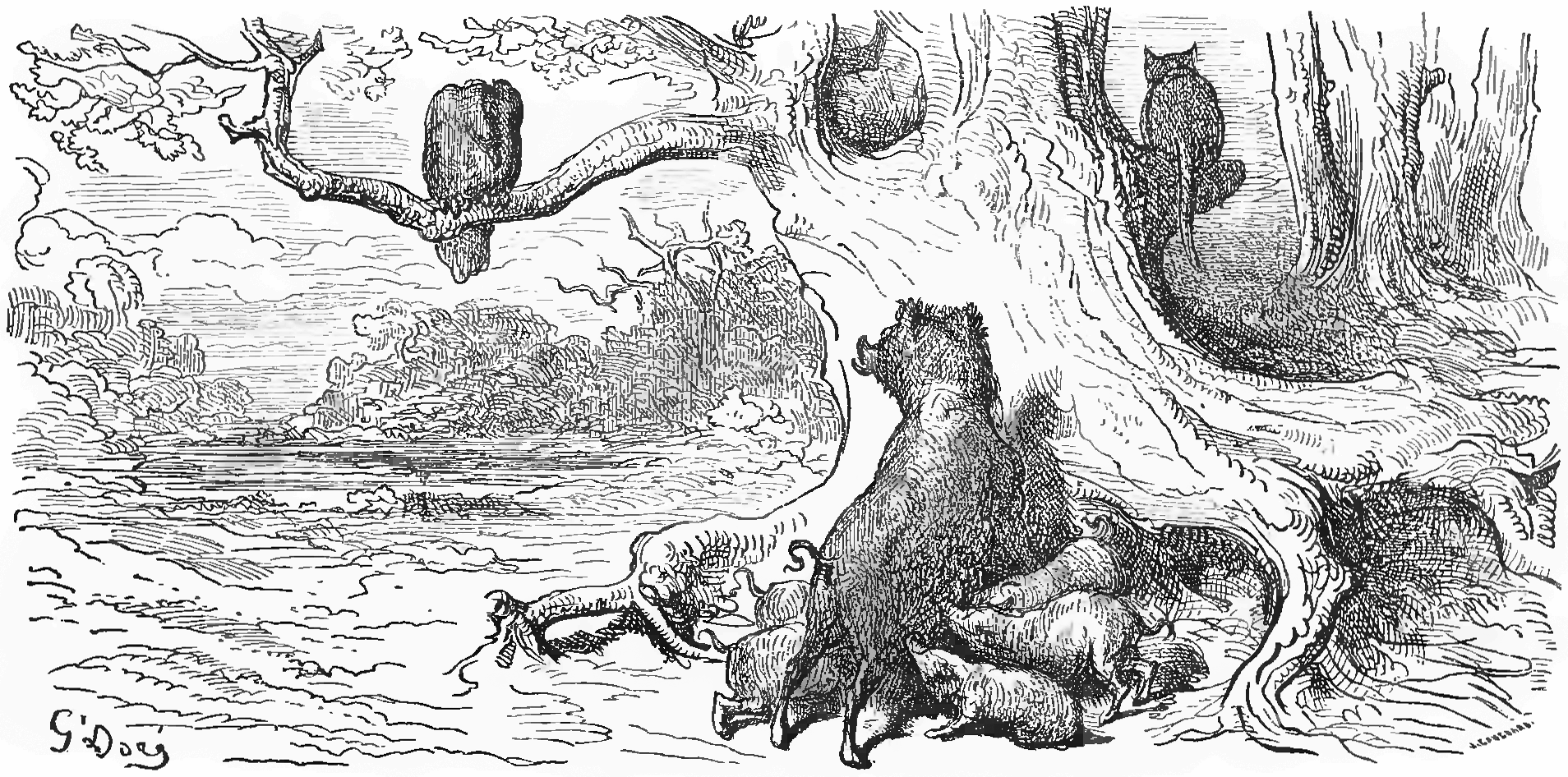 grafika z książki PL Bajki, Jean de La Fontaine, nakładem i drukiem Jana Noskowskiego, Warszawa 1876